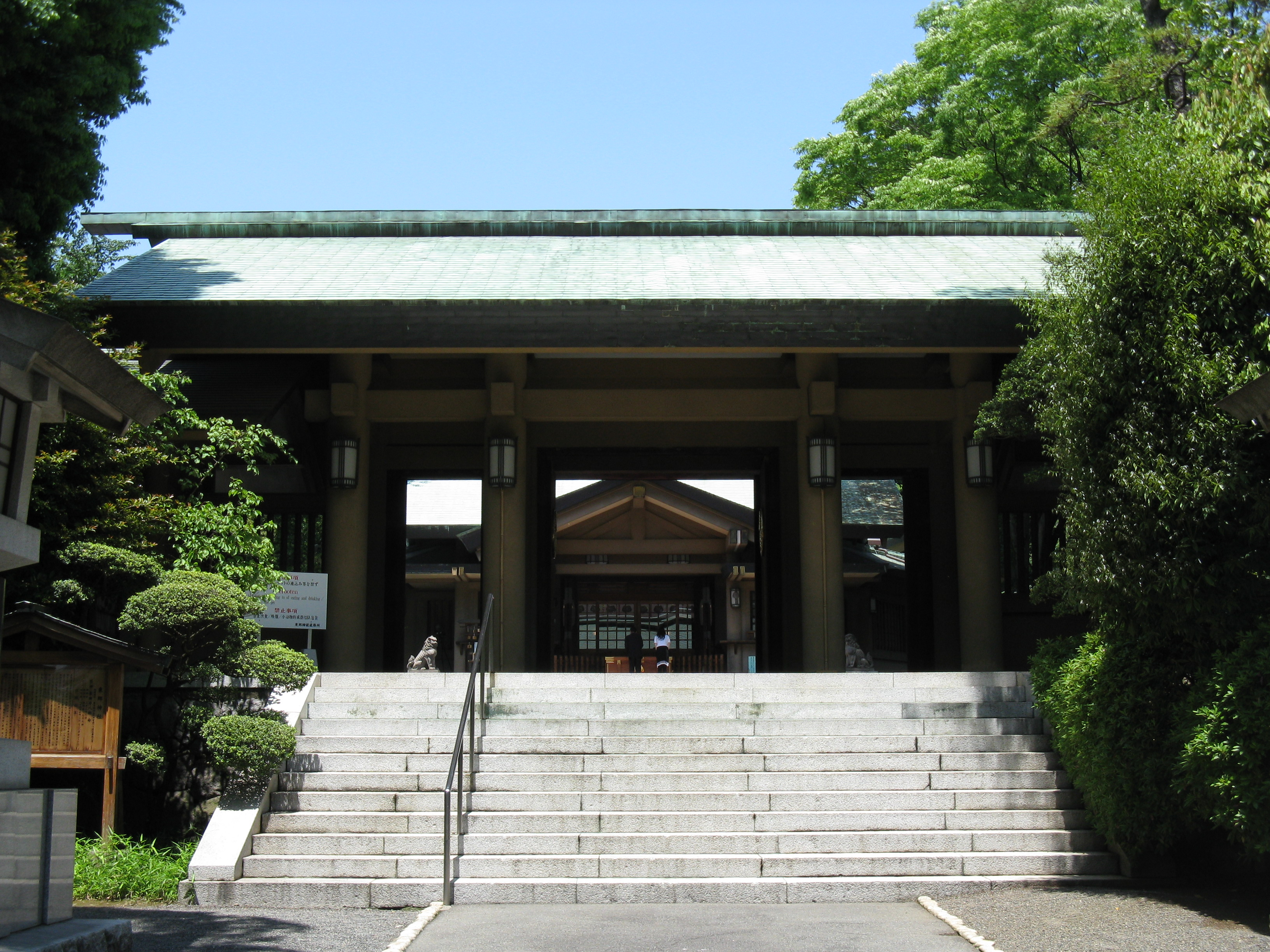 東郷神社 神門